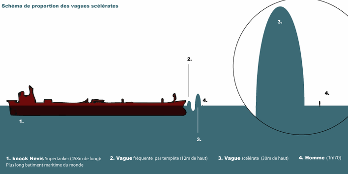 schéma de proportion d'une vague scélérate